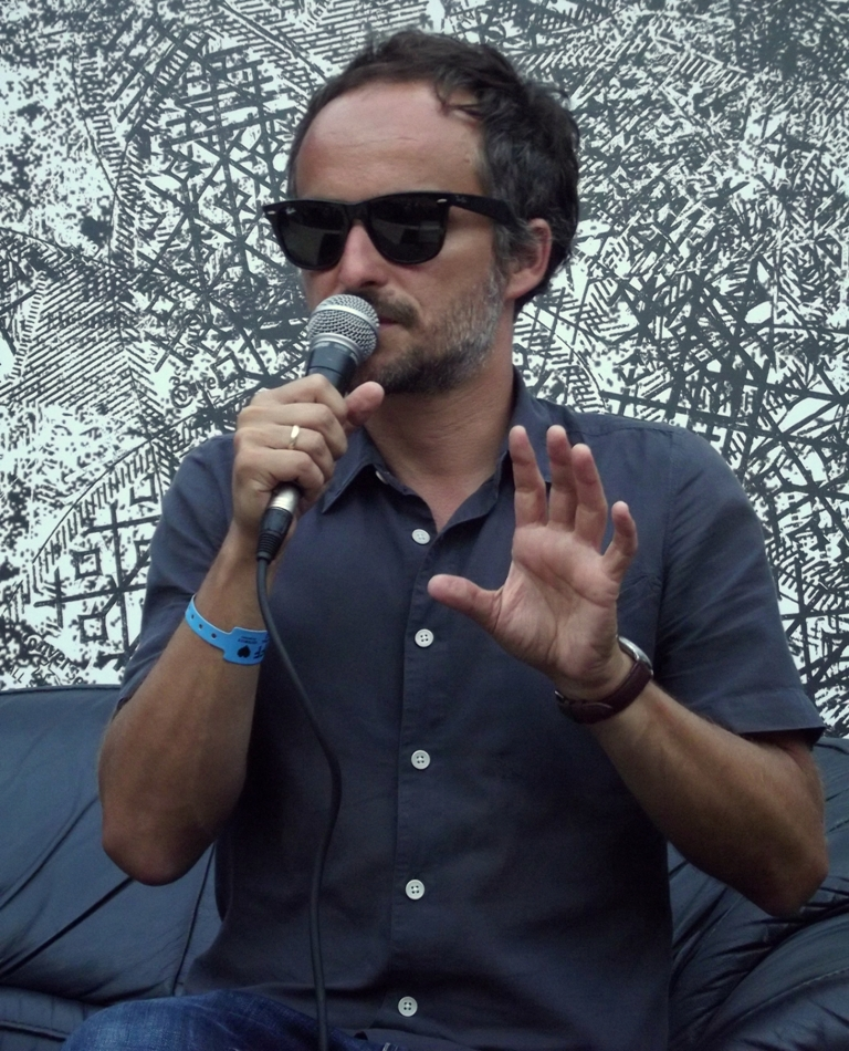 Zdjęcie zrobione podczas OFF Festival 2013 w katowickiej Dolinie Trzech Stawów.